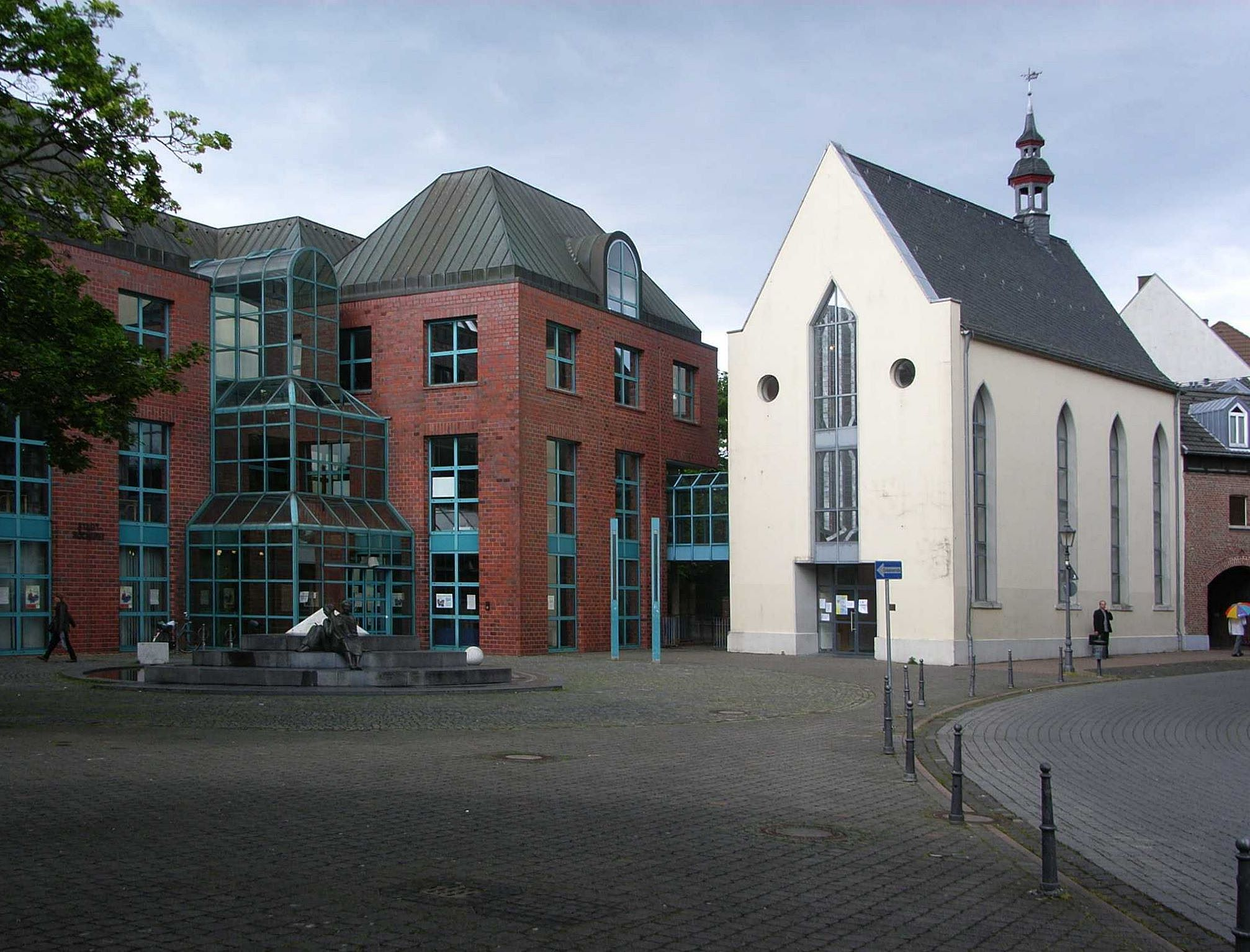 Erkelenz Leohardtskapelle und Stadtbücherei